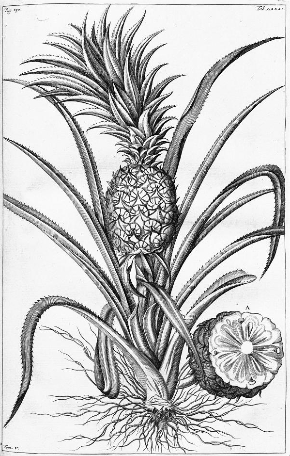 Imago Bromelia comosa